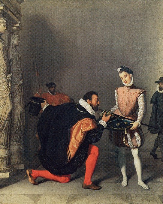 Don Pedro de Tolède baisant l'épée d'Henri IV, 1820